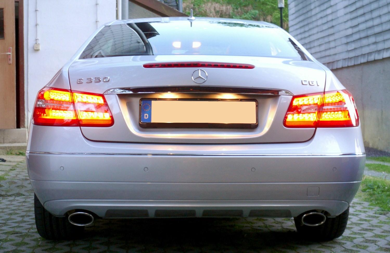 Mercedes-Benz C207 E 350 CGI